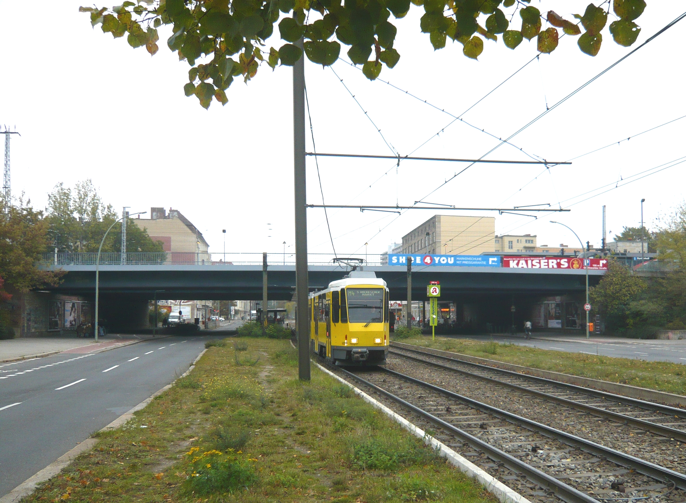 Greifwalder Straßenbrücke: Eisenbahn über Straße (1)